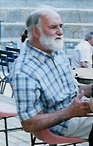 Auteur: Paturozoizo, Arthur à Orange 1999